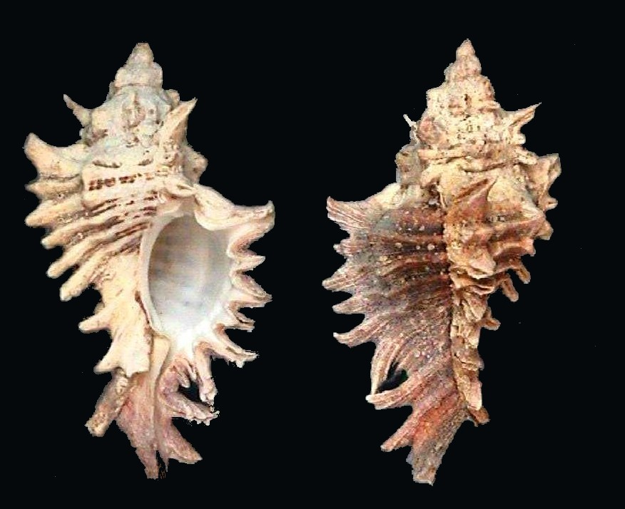 Foto de Chicoreus brevifrons (Gastropoda: Neogastropoda: Muricidae) del Golfo de Cariaco Estado Sucre - Venezuela